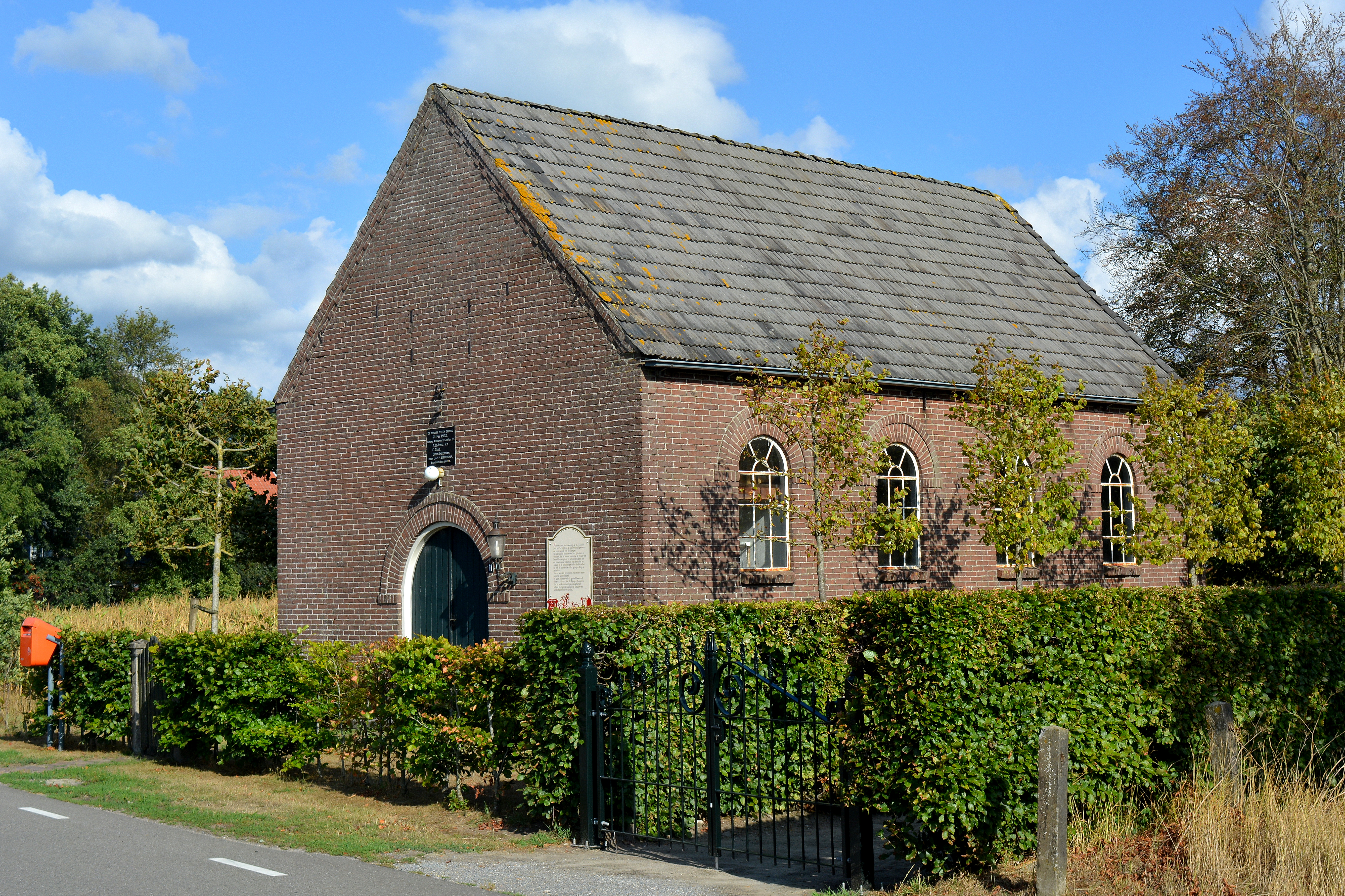 Rotstergaast (Lytse Gaast), tsjerke